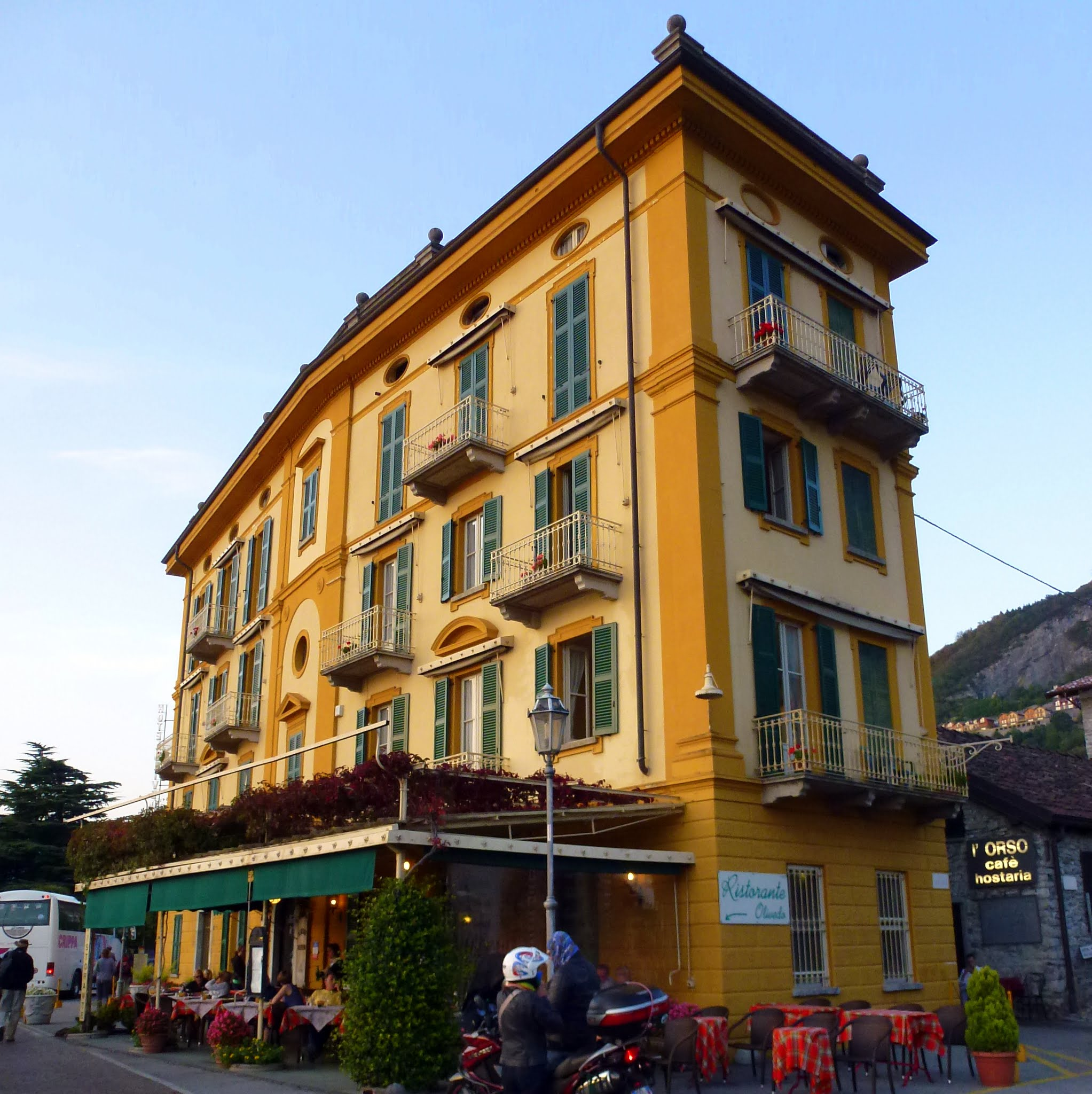 Hotel Olivedo & Villa Torretta Piazza Martiri della Libertà, 14 Varenna, Lecco, Italy